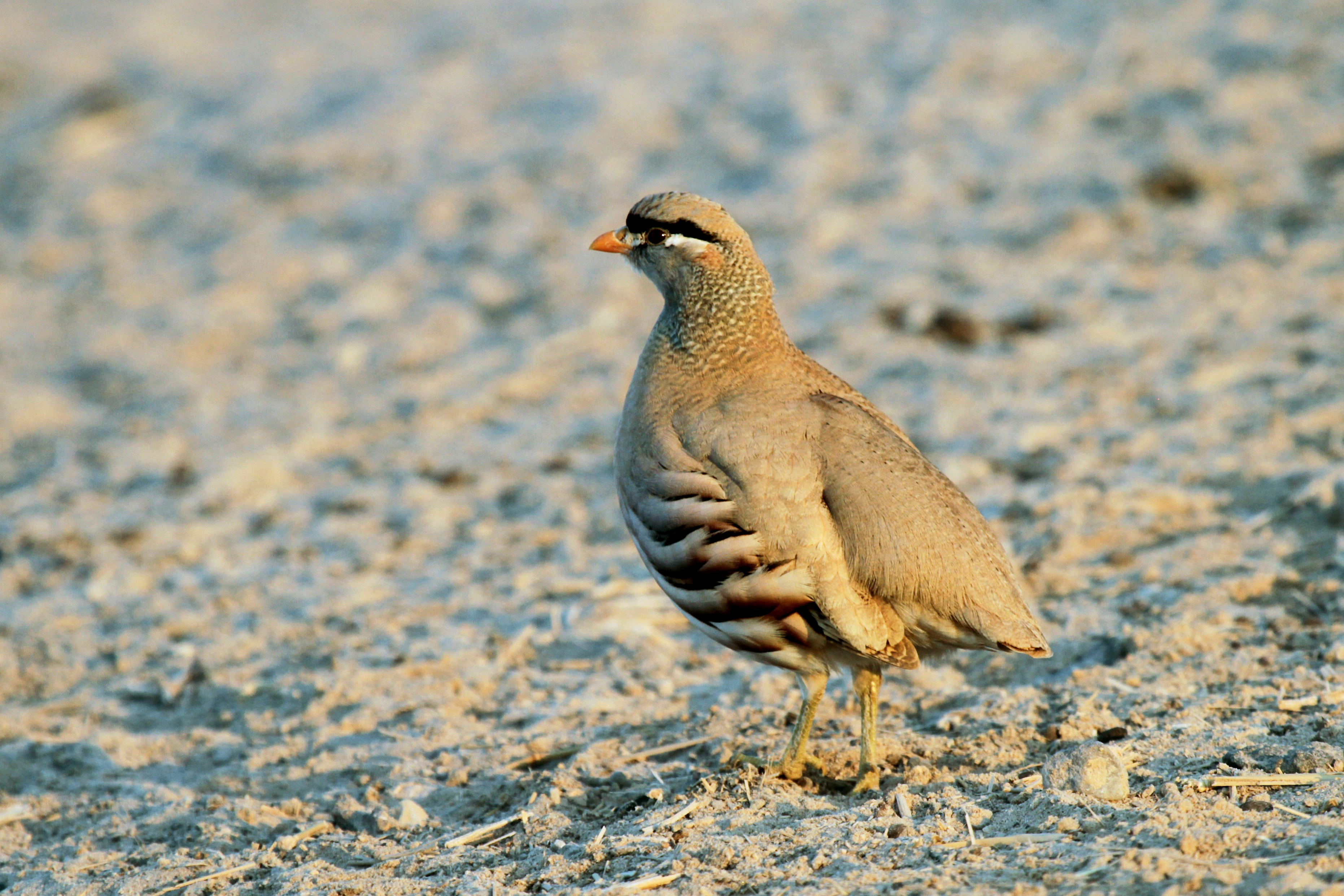 Sir Bani Yas, 3 Dec 2010